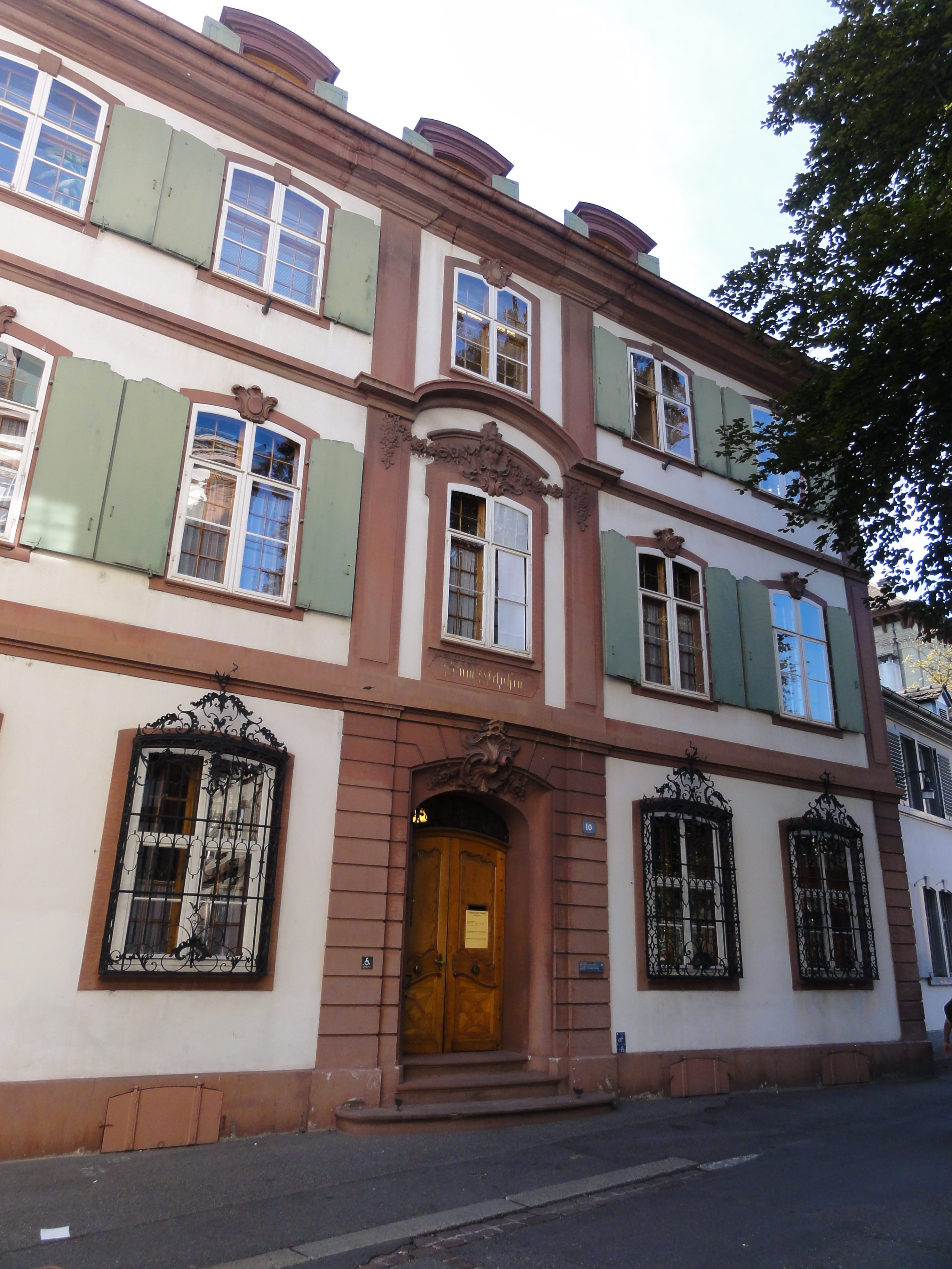 Basel Stadt, Rittergasse 10 (früher 20; Haus „Zum Delphin“) — Teilansicht. Architekt: Samuel Werenfels, Baujahr 1760